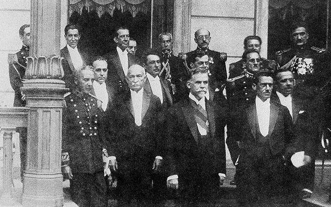 O Presidente do Brasil Washington Luiz e Ministério, 1926.